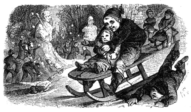 (Schlitten)